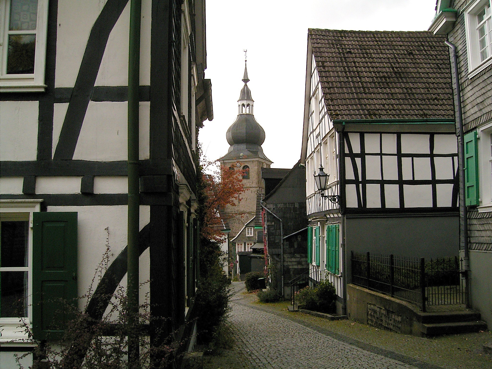 Remscheid - Lennep